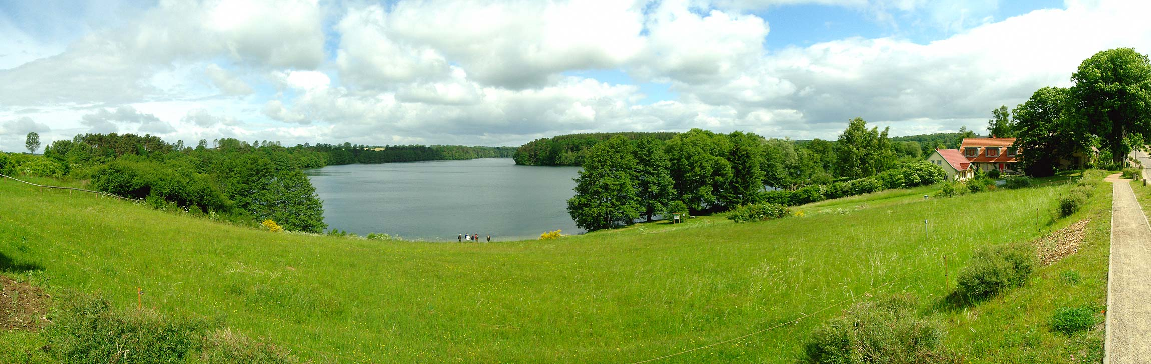 Panoramablick auf den südlichen Teil des Schmalen Luzins von Carwitz aus